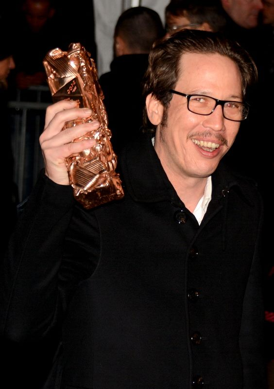 Reda Kateb à la cérémonie des César